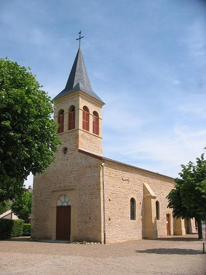 Eglise de Vindecy après restauration. les murs de la nef sont largement appareillés en arête-de-poisson